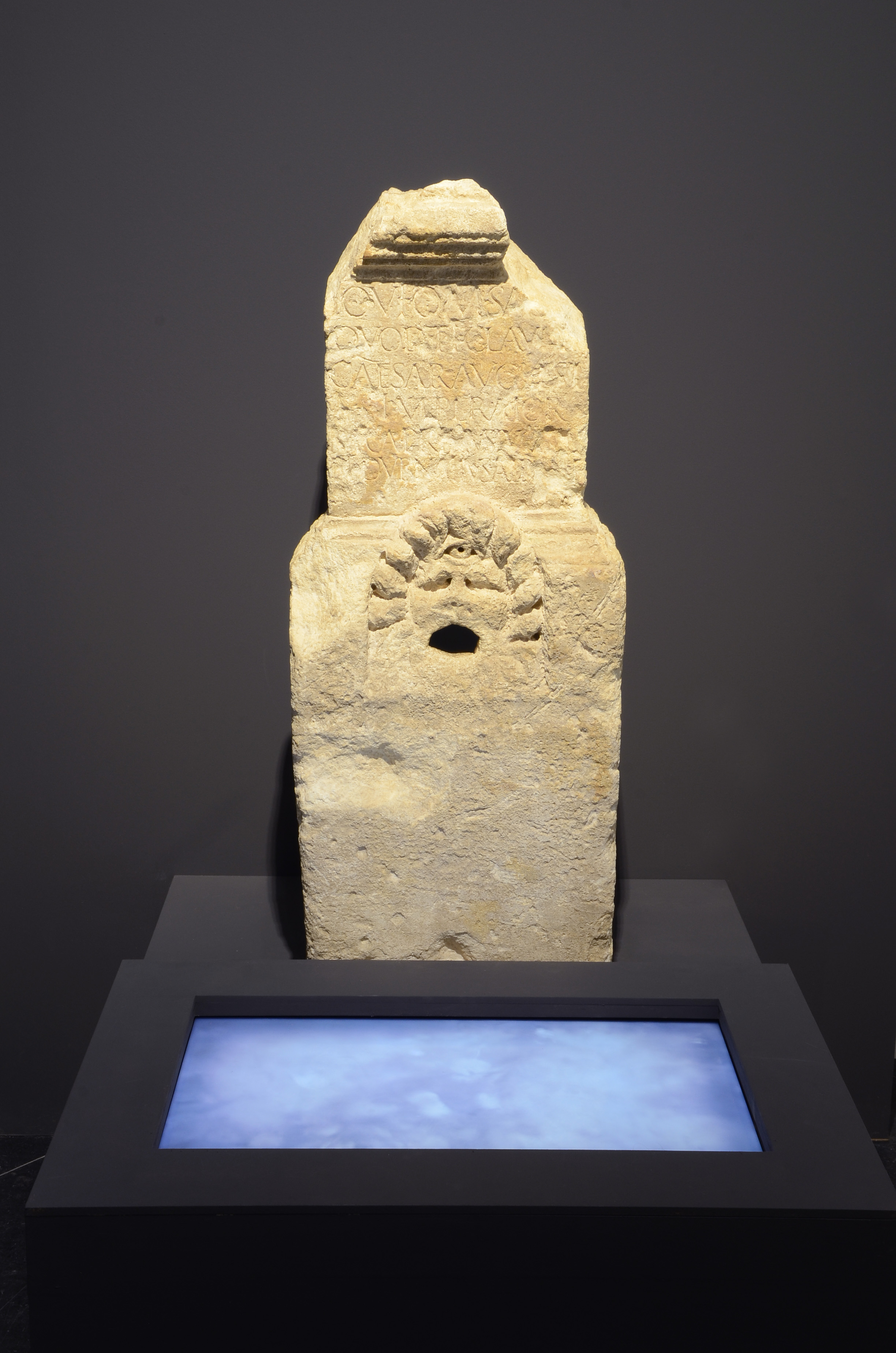 Découverte à Lyon en 1967, calcaire tendre.